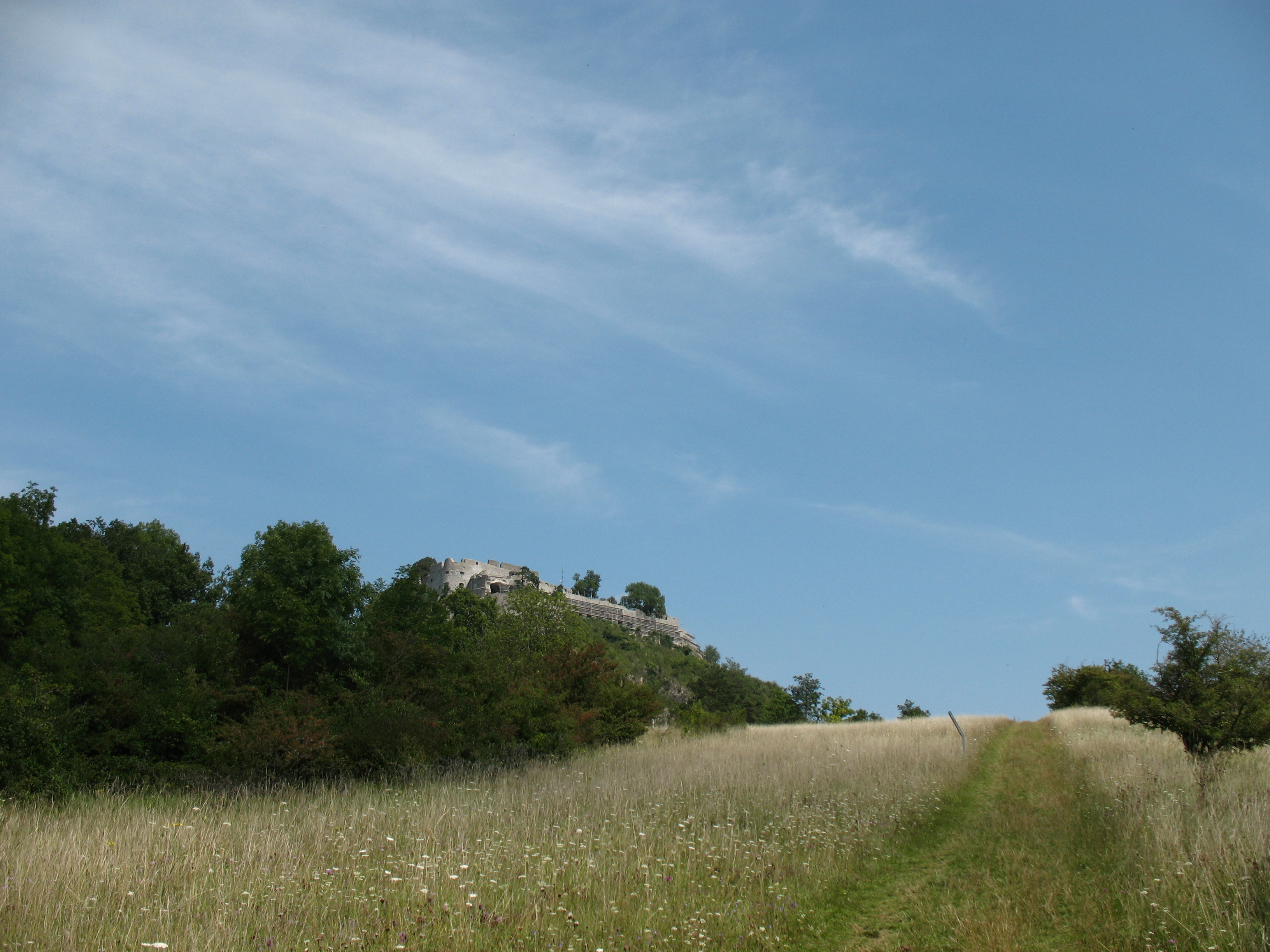 Blick vom Südhang über Trockenwiese, Buschwerk, Bäume hinauf zu Festungsruine Hohentwiel